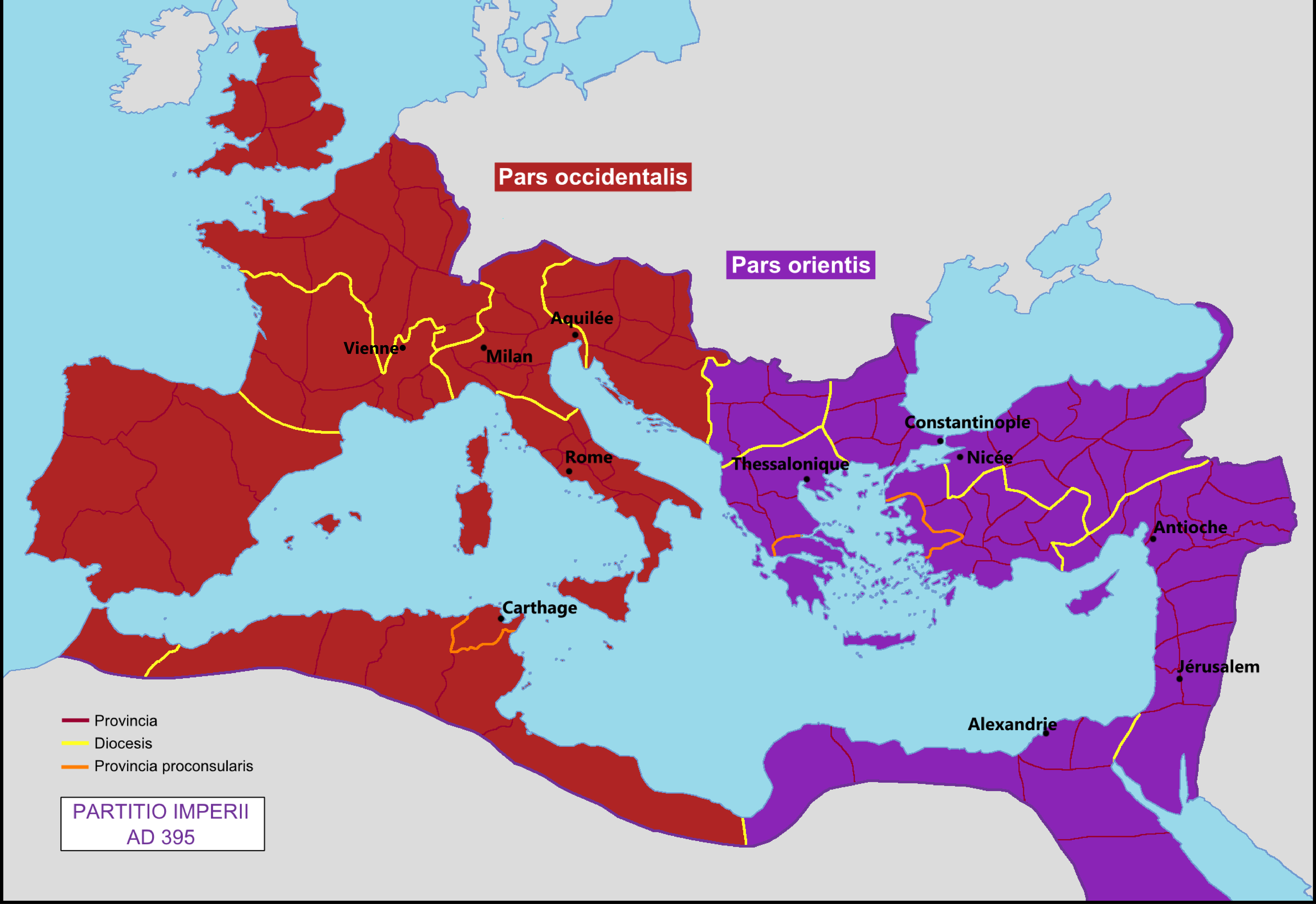 Partition de l'Empire Romain vers 395 à l'époque de Théodose Ier et de l'usurpation d'Eugène